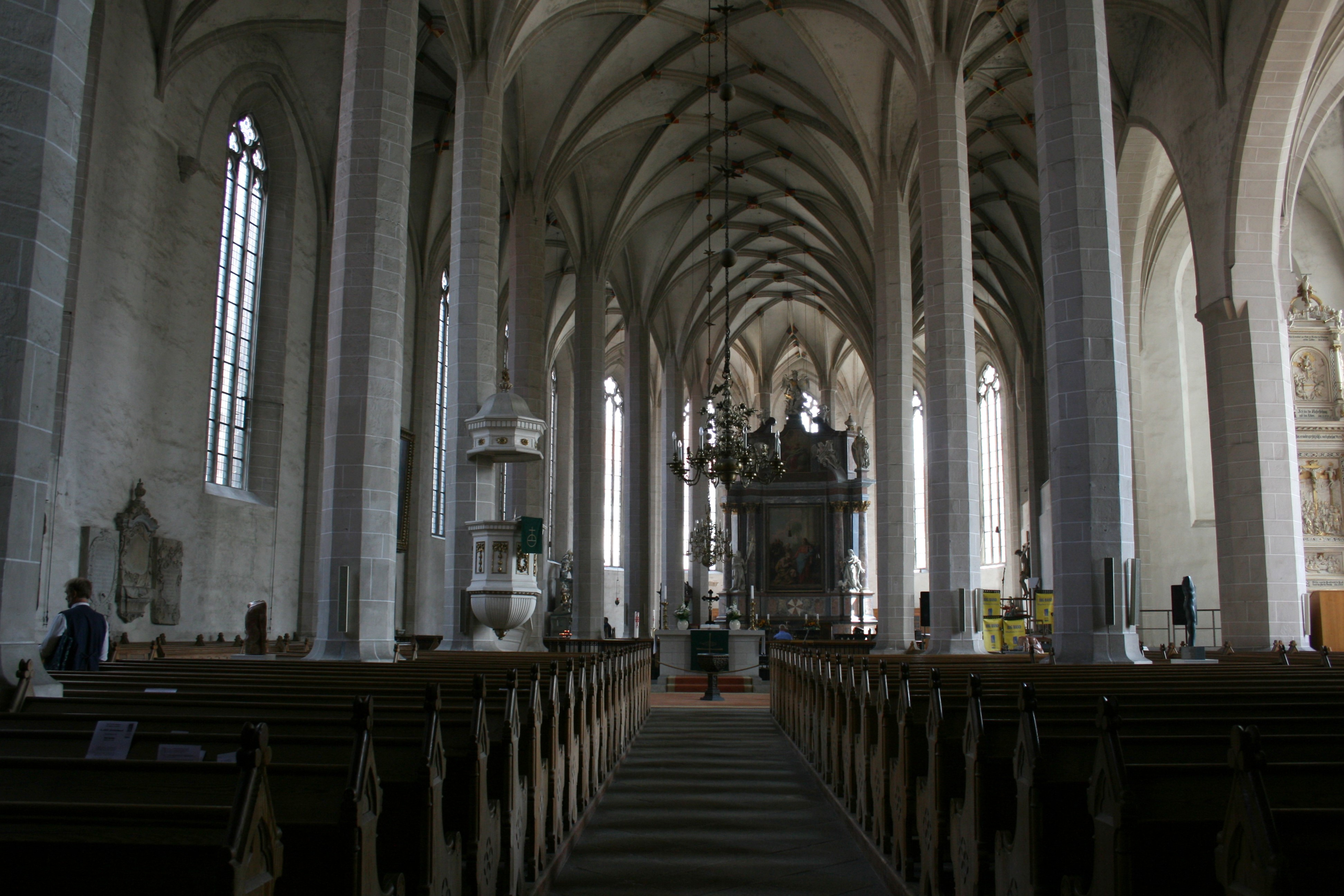 Dom St. Petri in Bautzen, vorne der evangelische, hinten der katholische Teil Hornjoserbsce: Tachantska cyrkej swj. Pětra w Budyšinje. Prědku ewangelski, zady katolski dźěl.